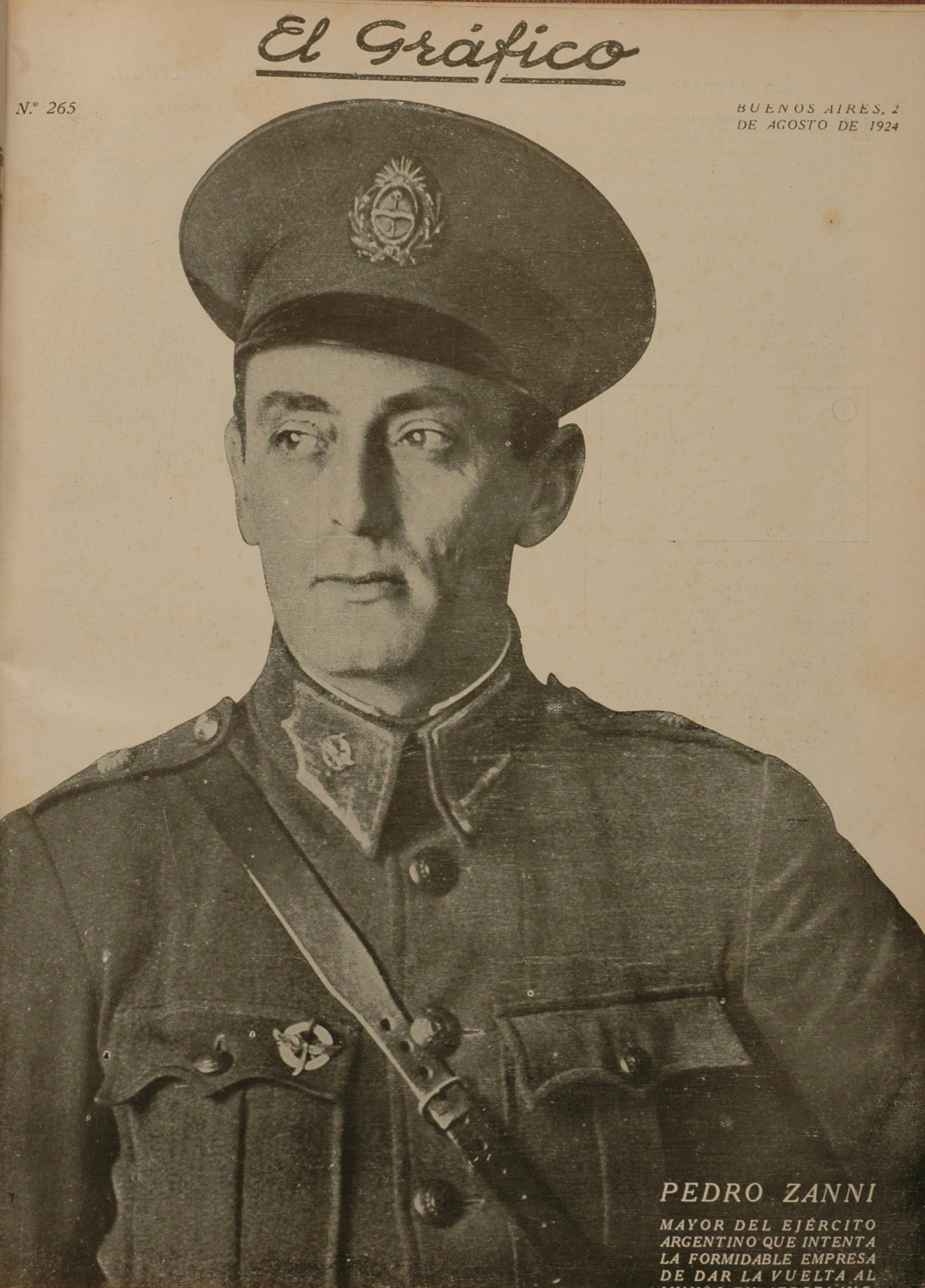 El Grafico del 02 de Agosto de 1924. Edicion 265